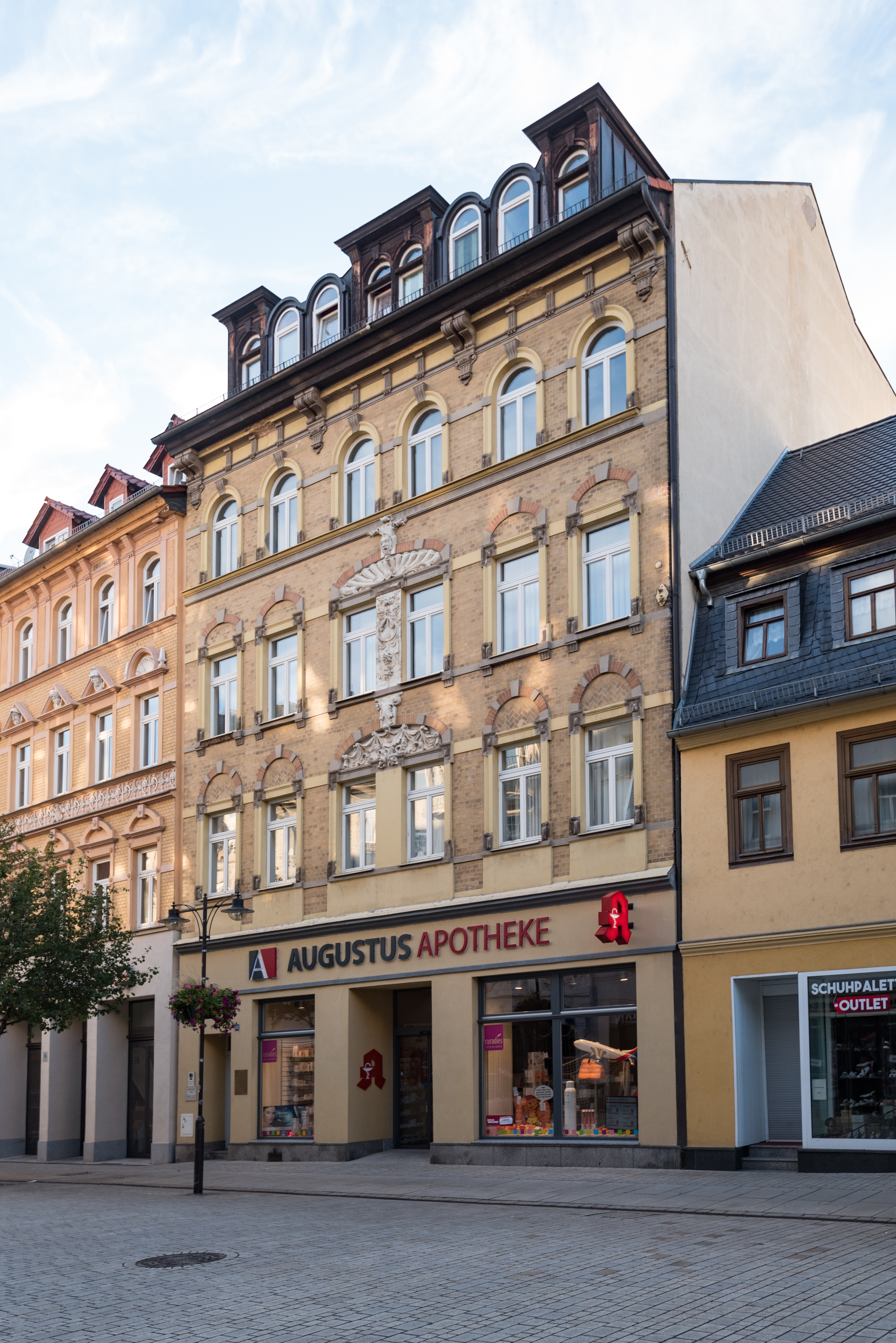 Weißenfels, Jüdenstraße 13